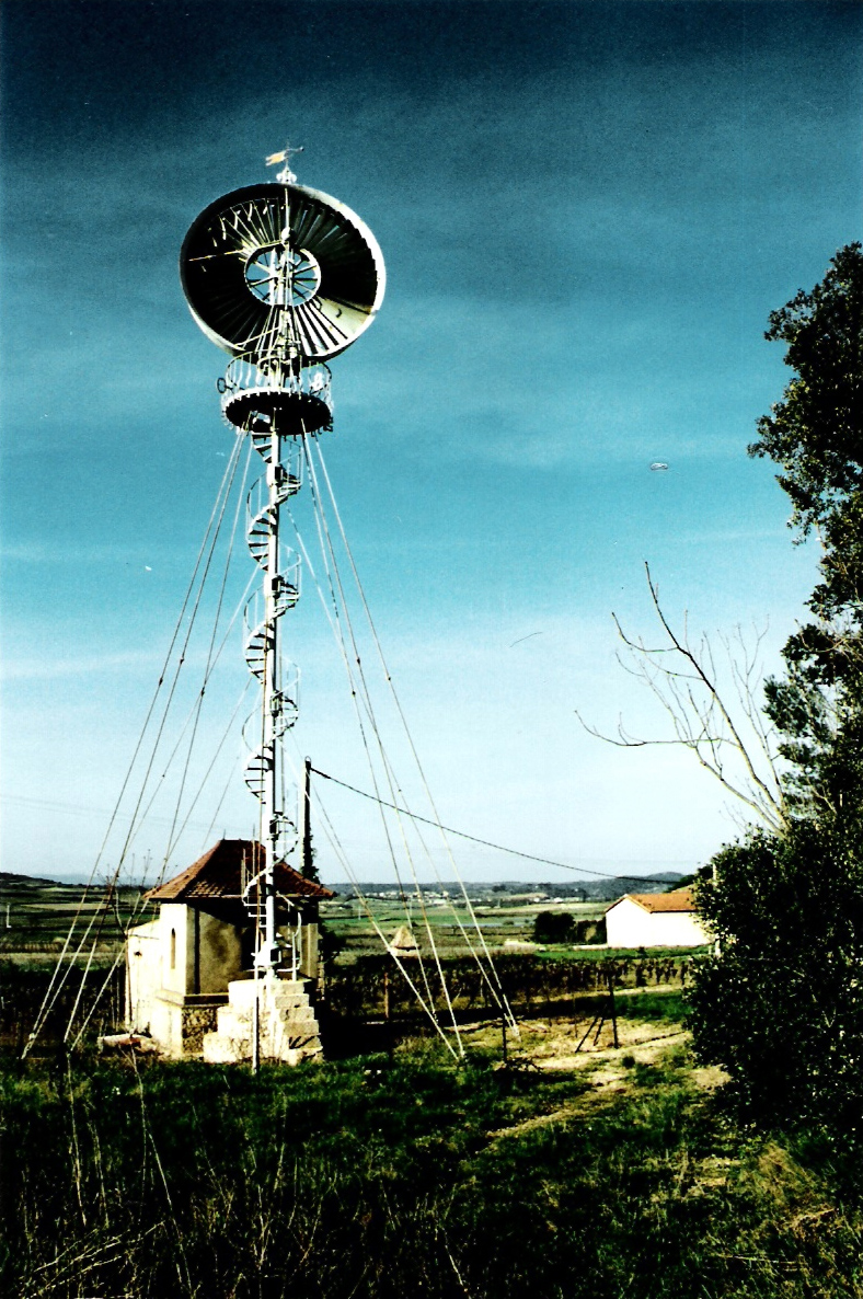 Éolienne Bollée à Roueïre (1898) - Quarante (Hérault).